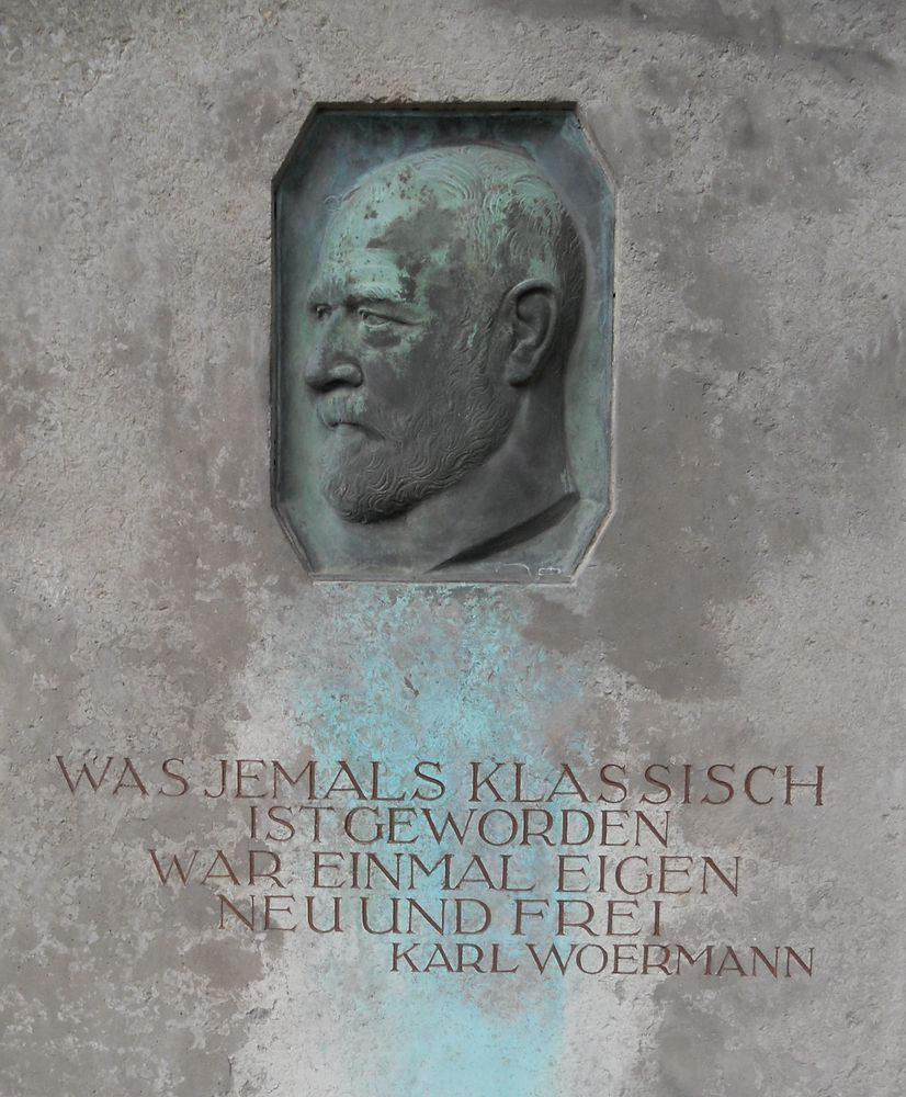 Grabmal auf dem Urnenhain Tolkewitz